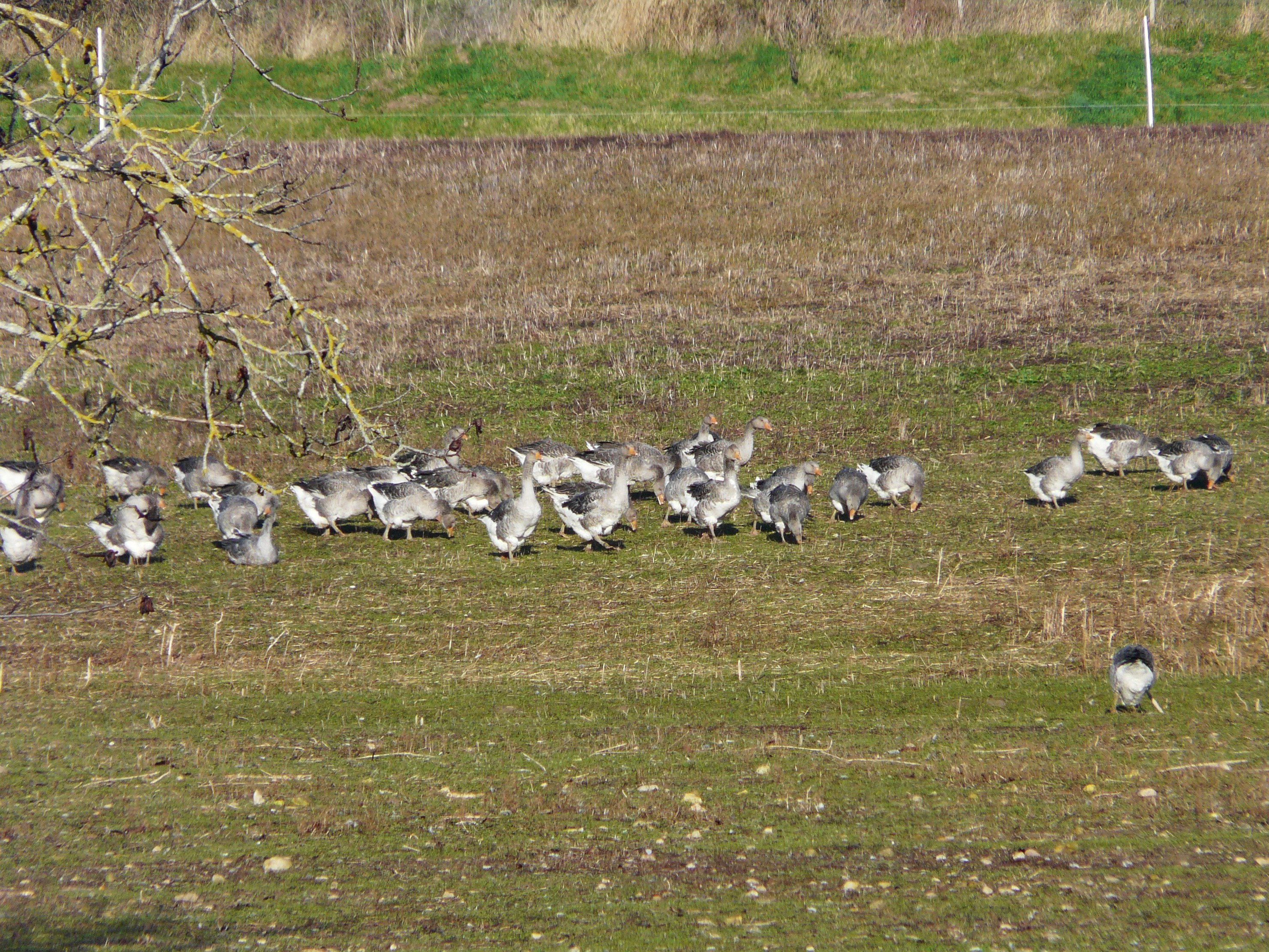 Élevage d'oies en plein air, Milhac-d'Auberoche, Dordogne, France.